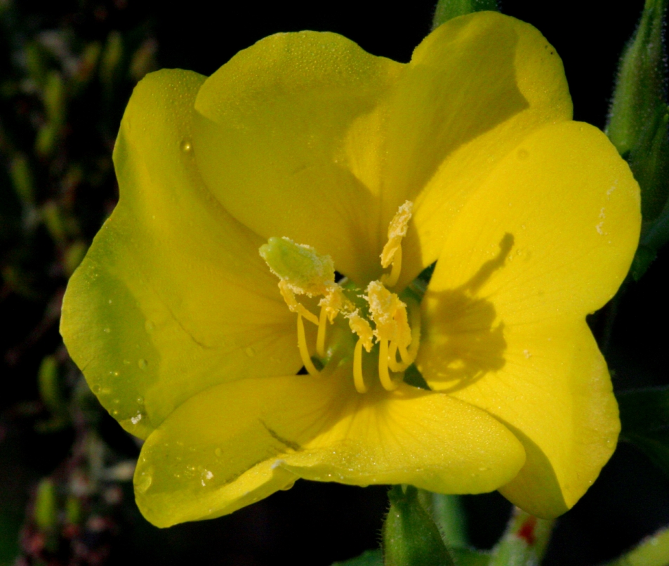 Oenothera_biennis (Enagra comune) Località : Praloran, Limana (BL), 319 m s.l.m.